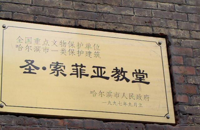 中文（中国大陆）: 圣索菲亚教堂牌匾